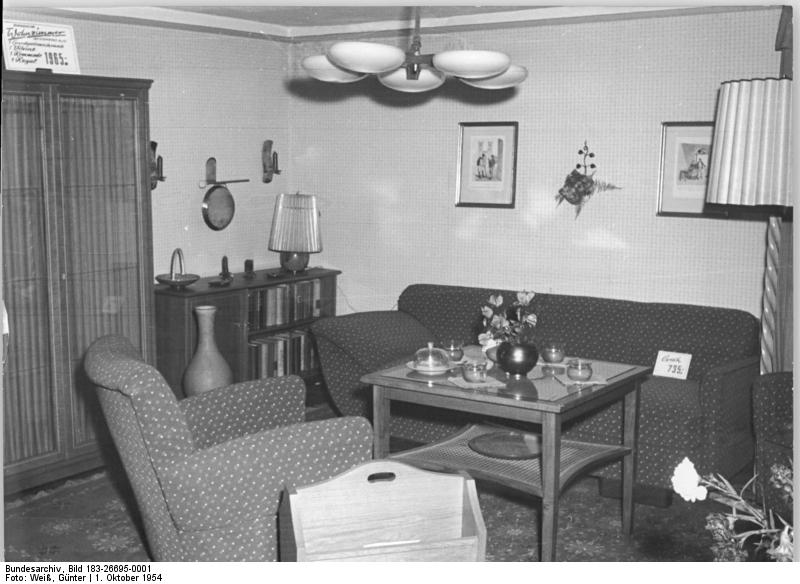 Berlin, Möbelausstellung, Musterwohnzimmer Zentralbild Weiß 4 Motive 1.10.1954 Ausstellung "Industrieläden beraten Sie" in Berlin, Schönhauser Allee. Zum ersten Mal seit ihrem Bestehen treten die Industrieläden des demokratischen Sektors von Groß-Berlin in einer Kollektivschau mit ihrem Verkaufssortiment an die Berliner heran. Die Industrieläden, die unmittelbar zu einem Produktionsbetrieb gehören, sind die küzeste Verbindung zwischen Produktion und Verbraucher, deshalb sind die Wünsche der Besucher wertvolle Hinweise für die Produktionsstätten. U.Bz.: Das Wohnzimmer "Teestunde", Aussteller: Möbel und Kunstgewerbe Industrieladen Zeulenroda.